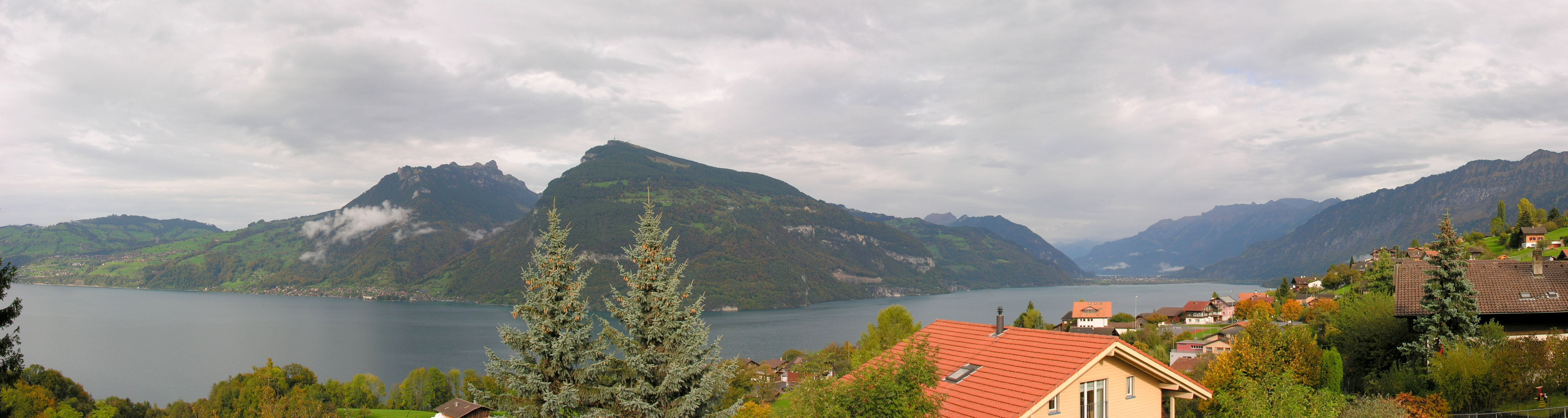 Krattigen